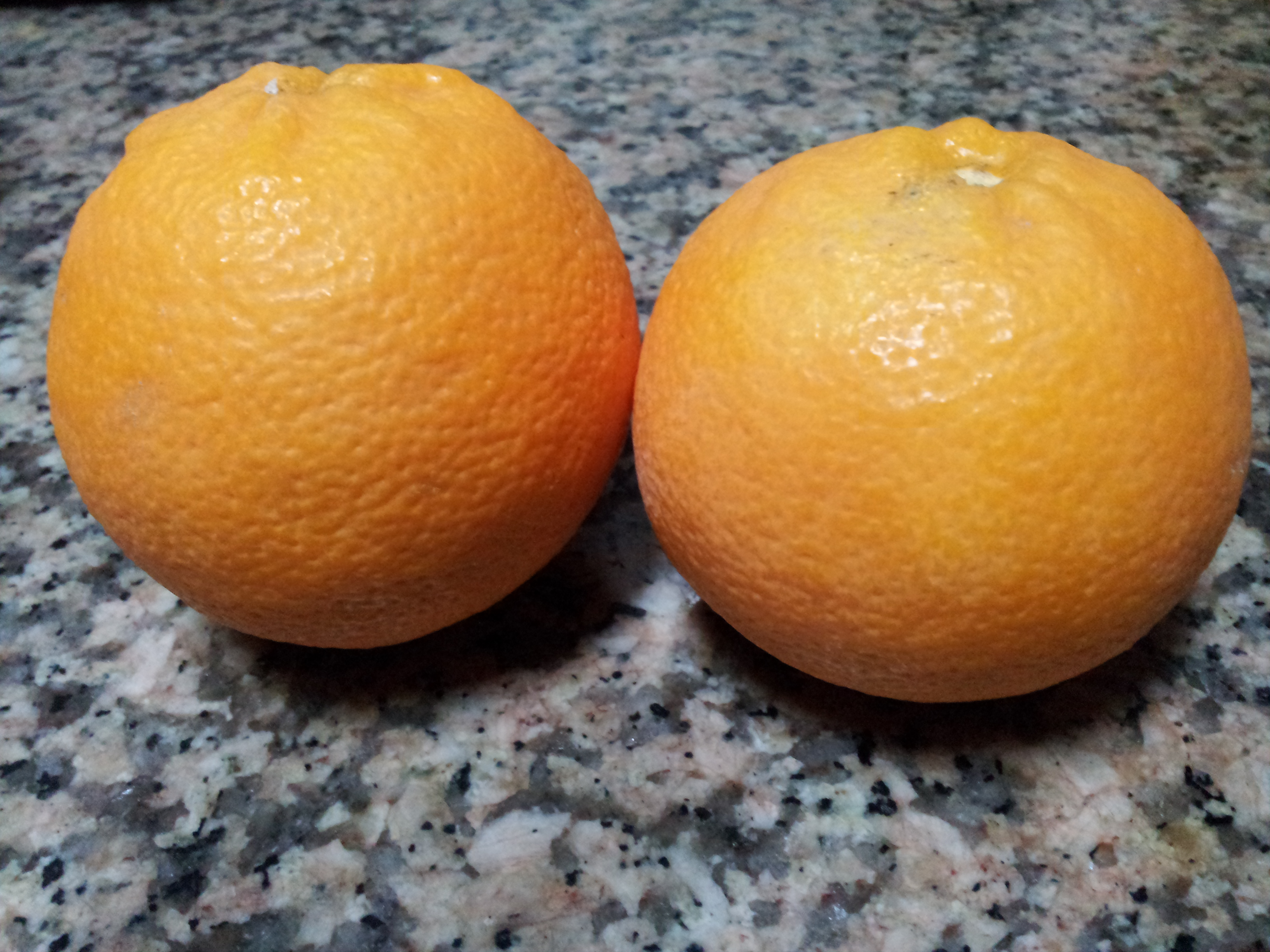 Taronja salustiana.